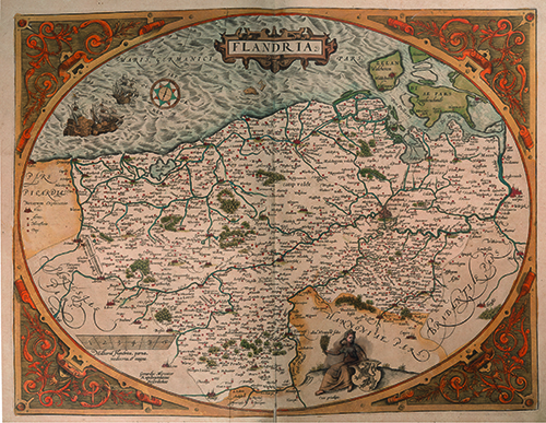 Abraham Ortelius, Theatrum orbis terrarum, 1574, papier, 405 x 280 mm.